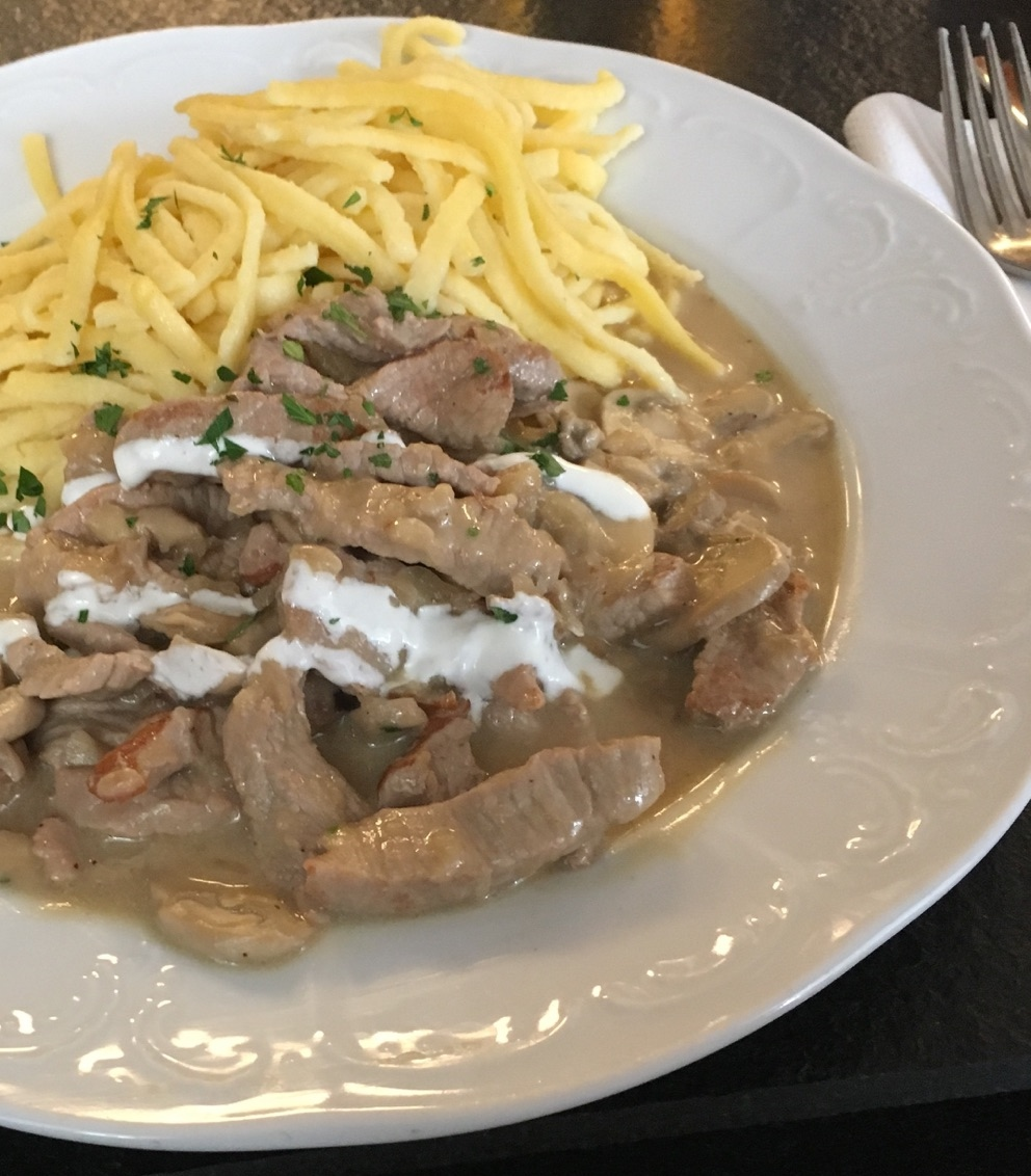 Zürcher Geschnetzeltes mit Spätzle, Waldviertler Hof, Wien 2017